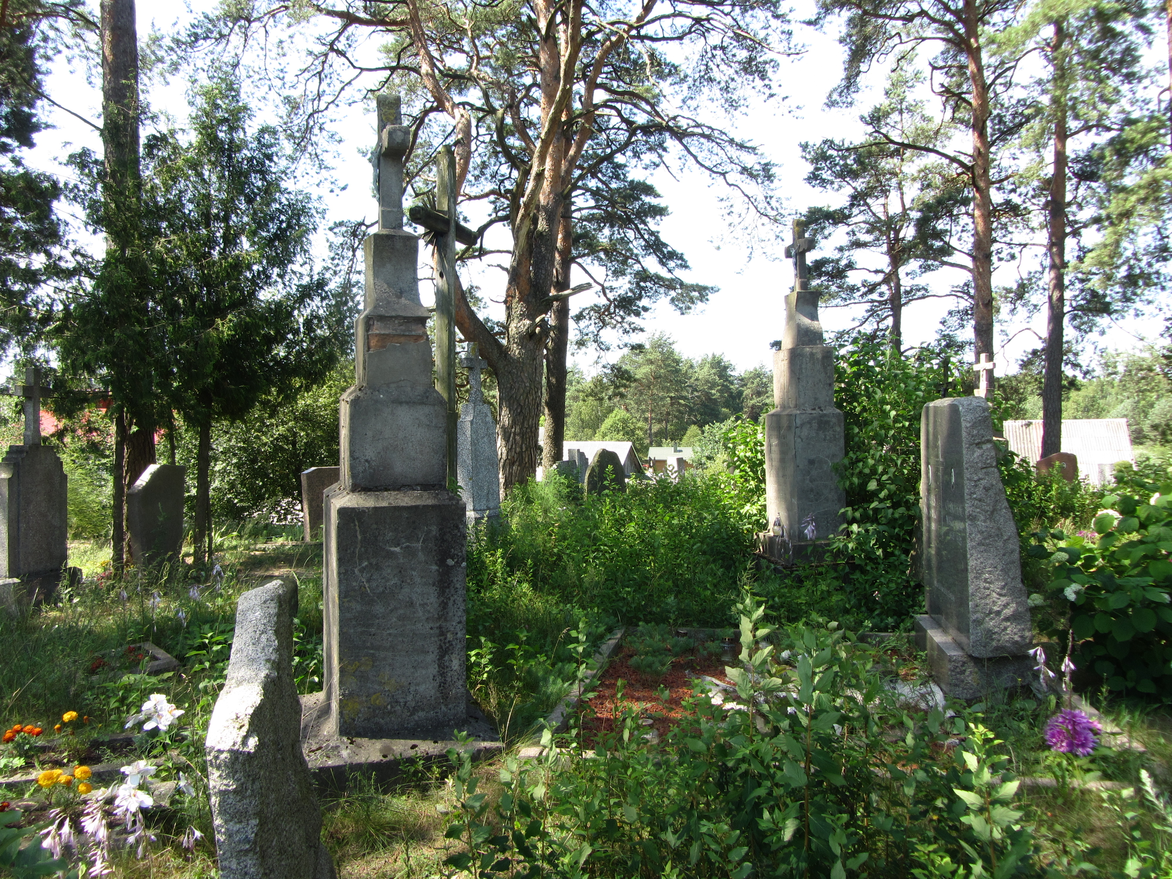 Urkionys 65475, Lithuania